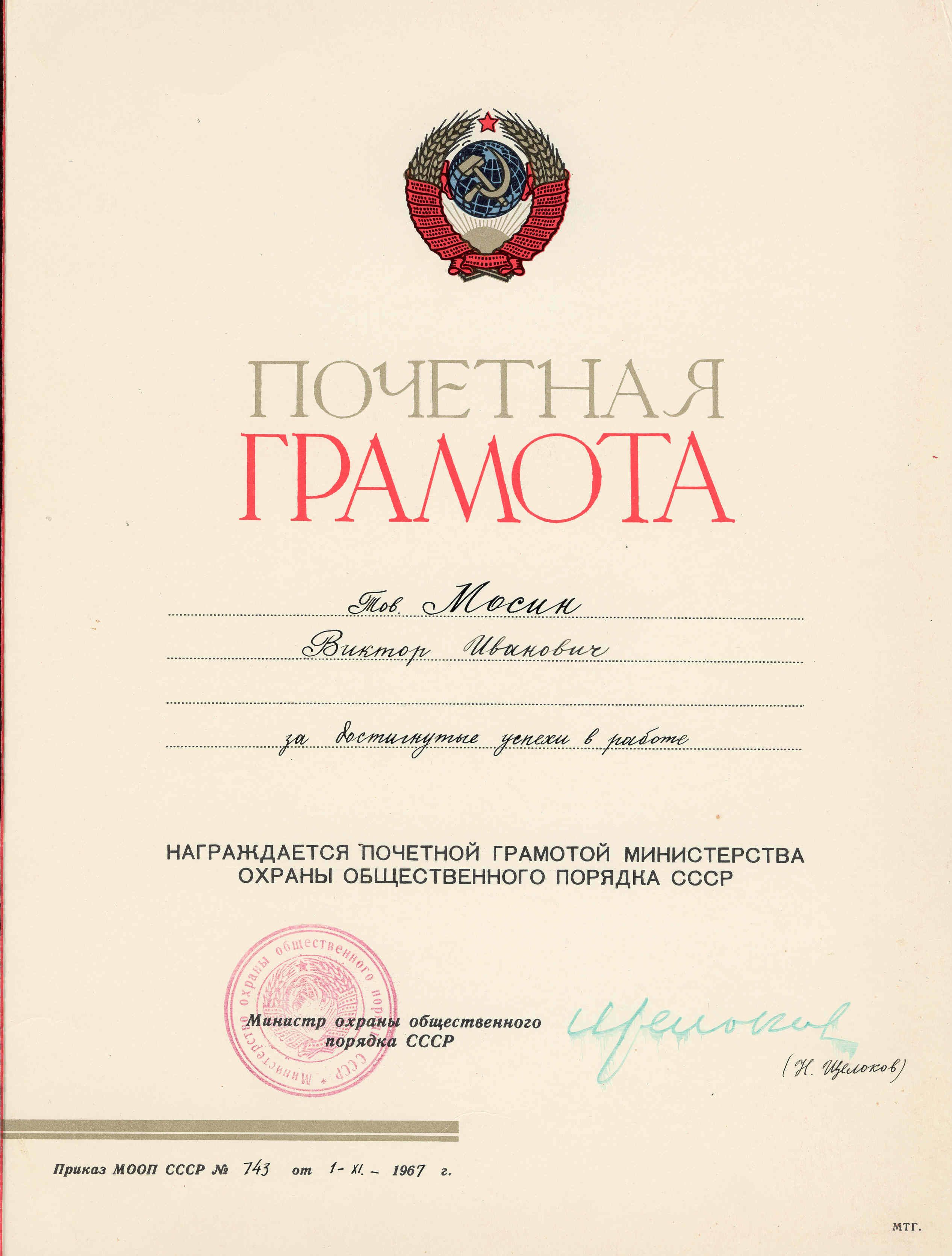 Почетная грамота министерства охраны общественного порядка СССР